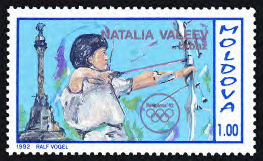 Source: Post of Moldova